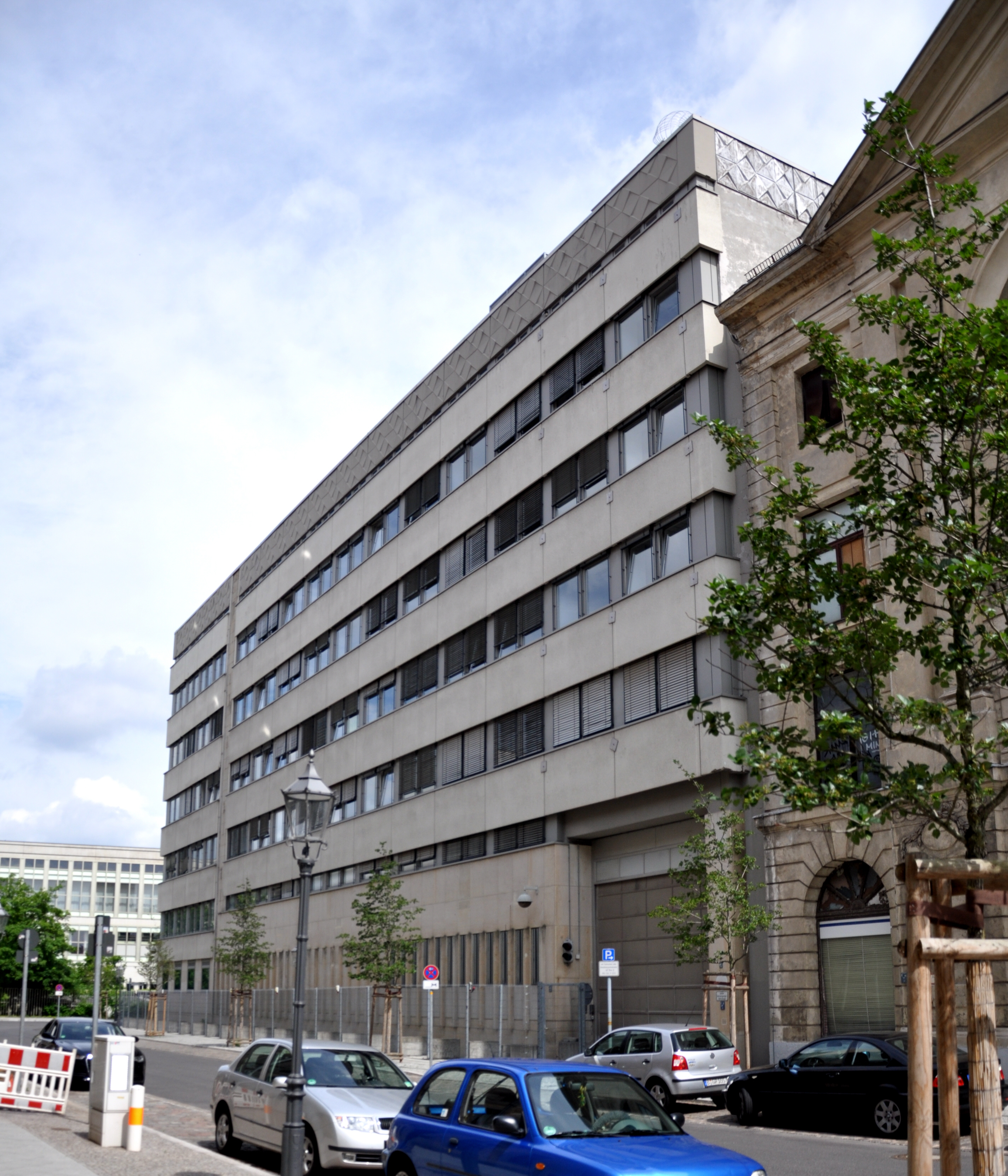 Berlin, Brüderstraße, Gebäude des Ministeriums für Bauwesen der DDR (soll 2012 abgerissen werden)